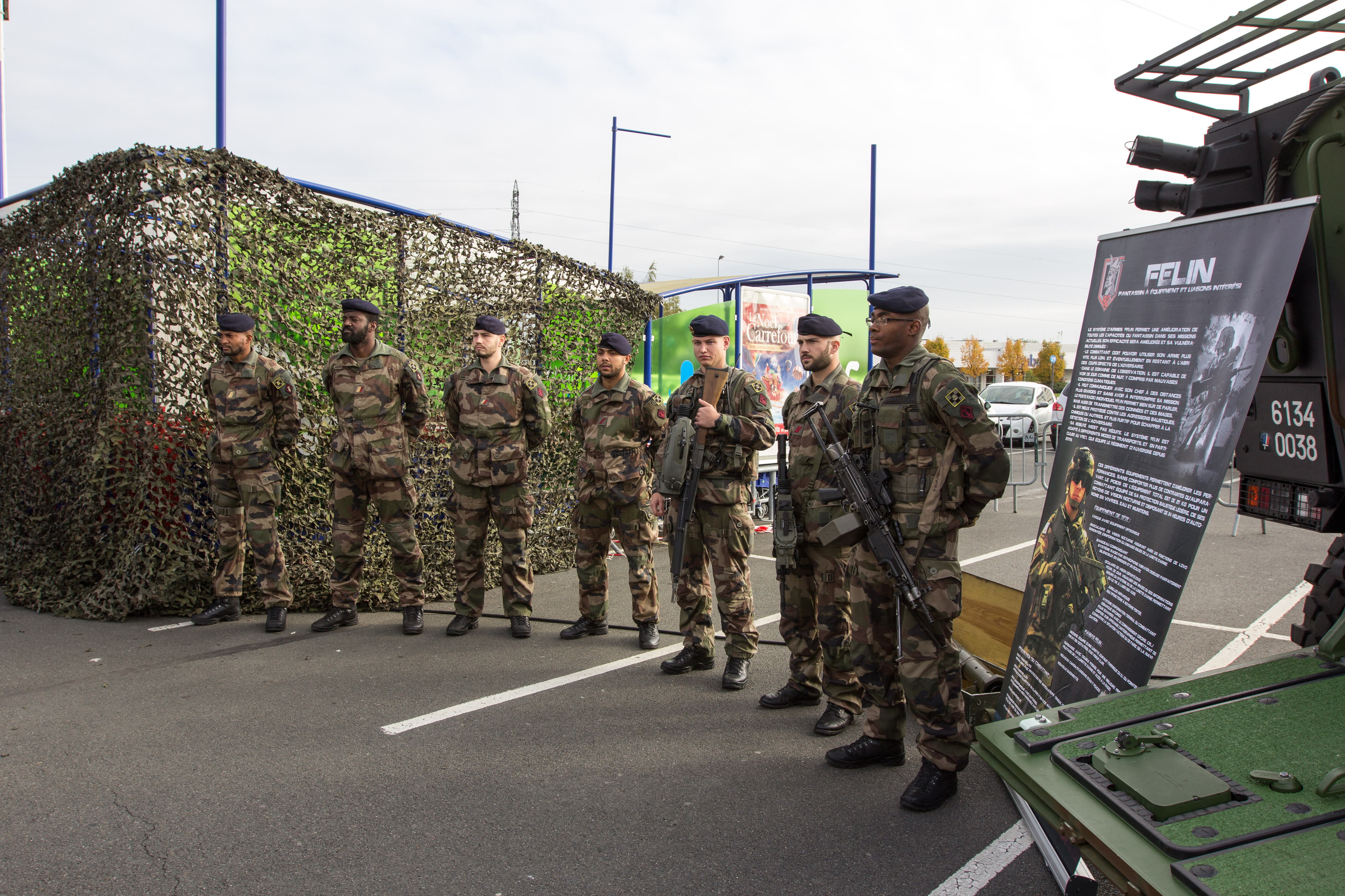 Matériel présenté lors de l'exposition "Les forces armées s'invitent à villabé", du 23 au 25 octobre 2014 au Centre commercial Villabé A6 / Villabé / Essonne / France